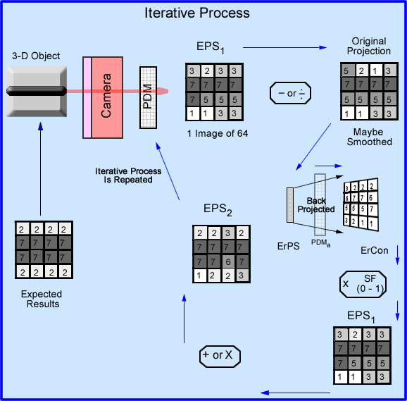 iterative process